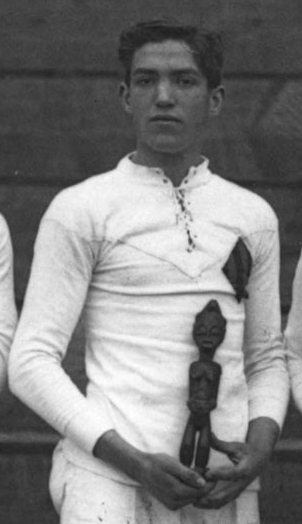 Aimé Giral, le 15-3-14, à Colombes, en maillot de l'équipe de Perpignan